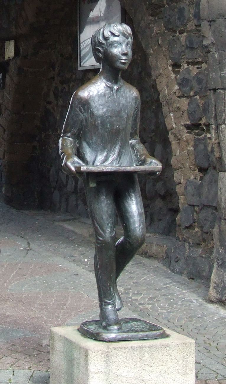 „Linzer Klapperjunge“ (1987) in front of the Neutor in Linz am Rhein